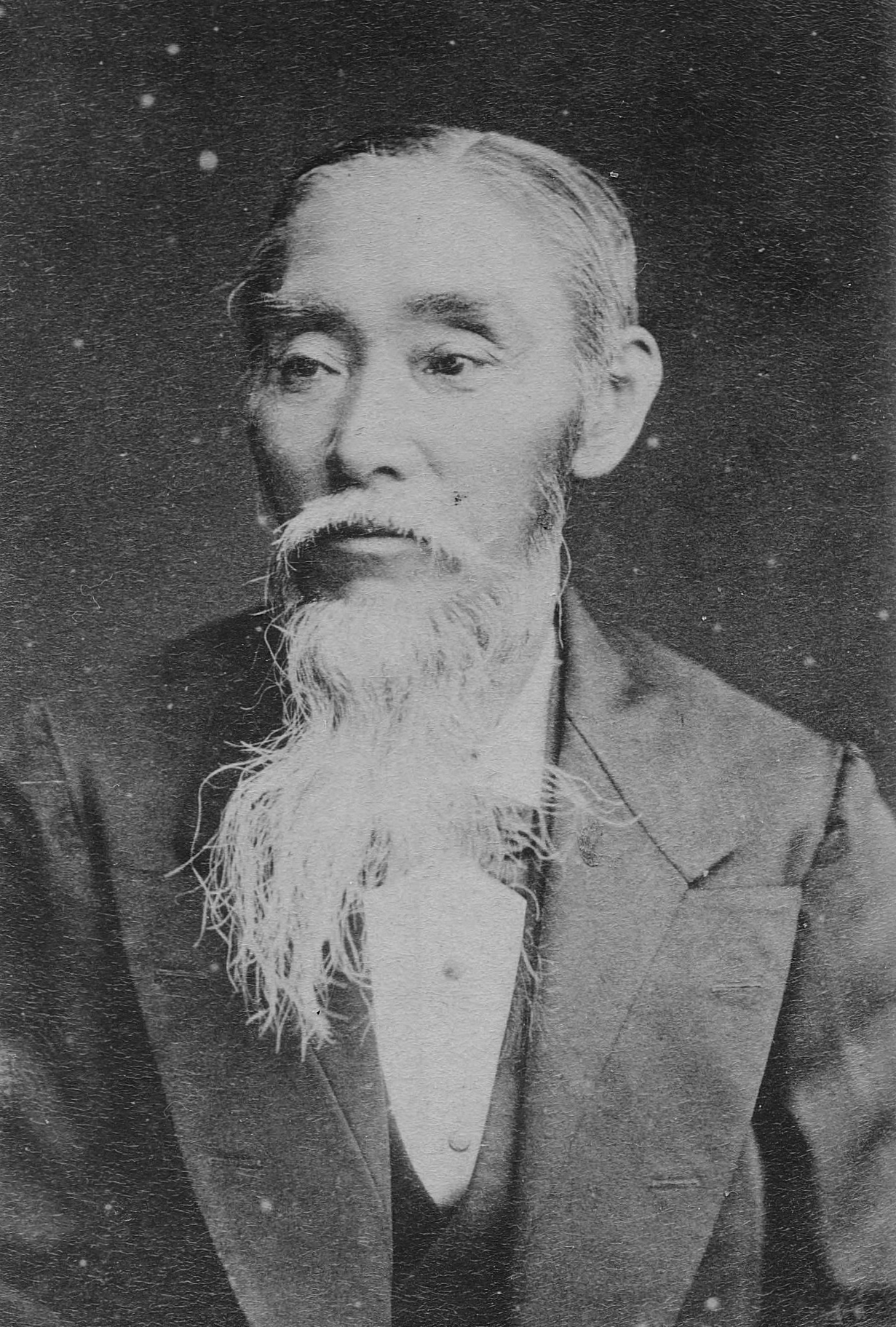 万里小路博房の肖像写真